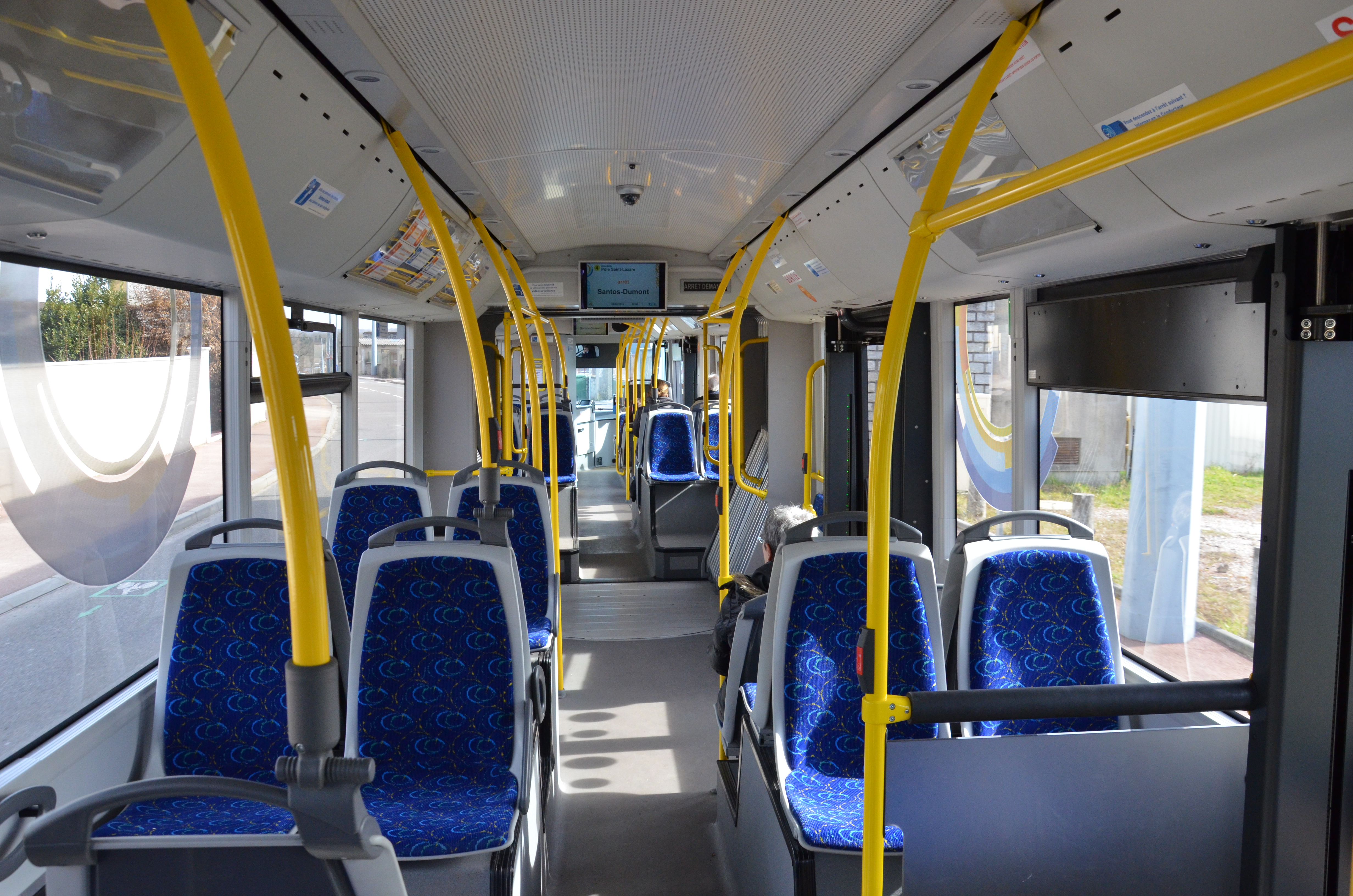 Intérieur d'un Hess Swisstrolley 4 du réseau TCL de Limoges.